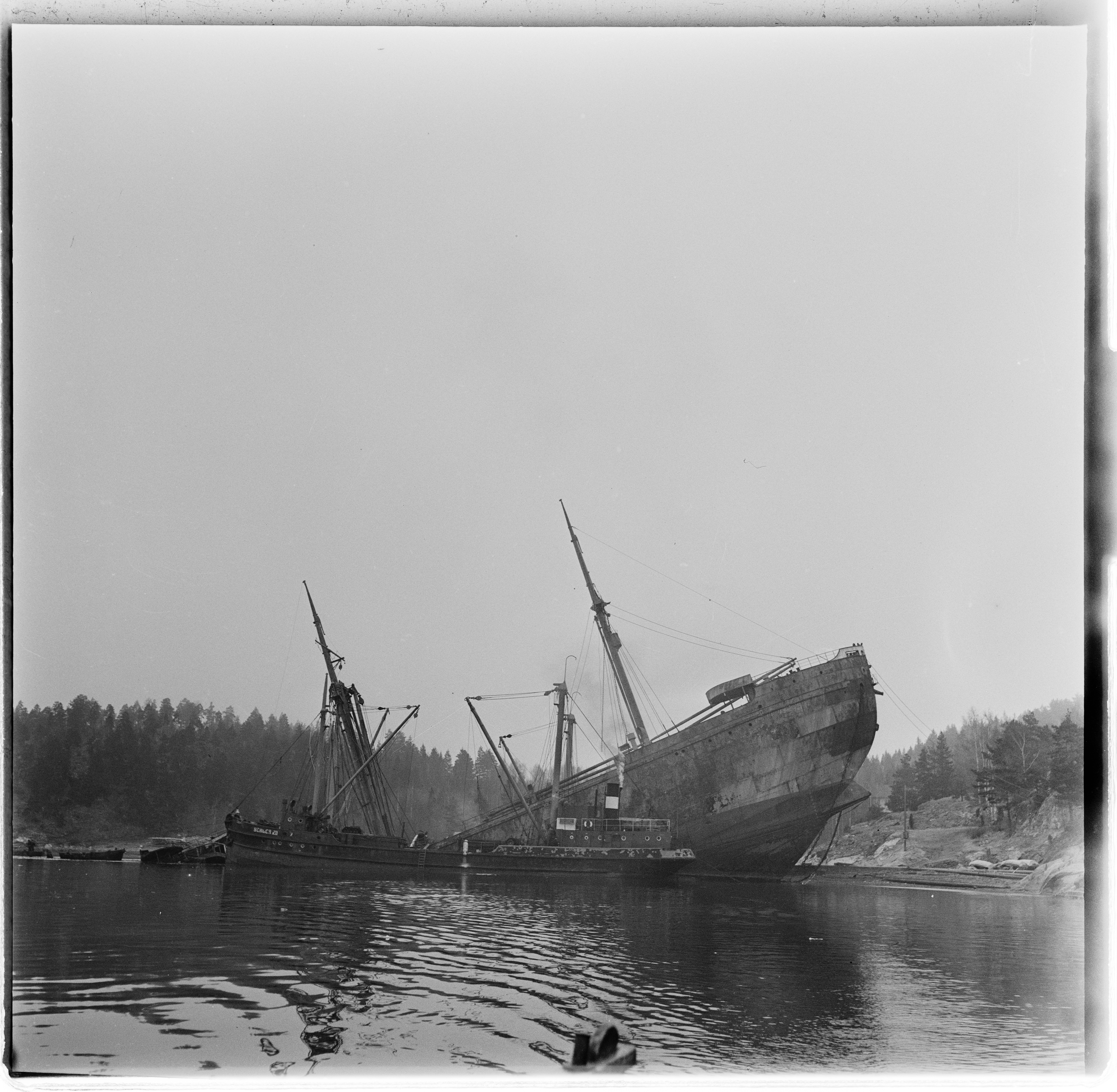 Bildet er hentet fra Arkivverket. Skipsvraket Donau. Foto tatt i forbindelse med at skipet ble hevet. NÅ nr. 8. Arkivinstitusjon : Riksarkivet Arkivnavn : Billedbladet NÅ Sted : Norge, Akershus, Ukjent, Emneord: Drøbak, SS Donau, Skipsvrak, Skip, Bergningsfartøy, DS Donau Avbildet